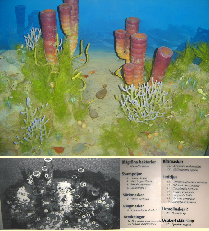 Faune du Cambrien (Museum d'Histoire Naturelle de Stockholm) (Image personnelle)